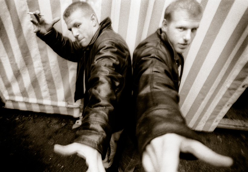 in Schenefeld